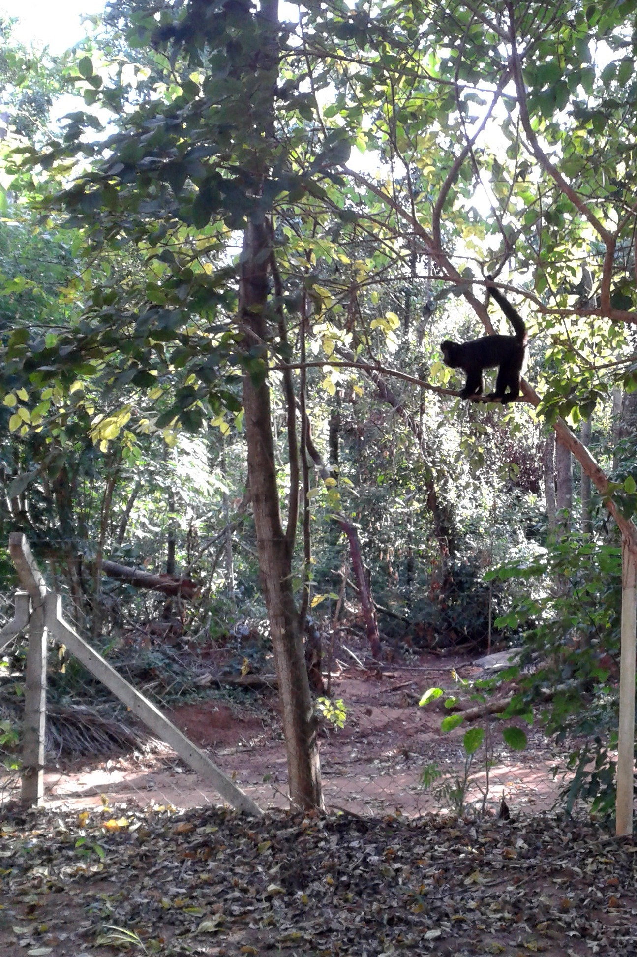 Macaco em cima da árvore, próximo da cerca da Unidade de Conservação: Área de Relevante Interesse Ecológico Mata de Santa Genebra - Fundação José Pedro de Oliveira, localizada em Campinas, São Paulo.